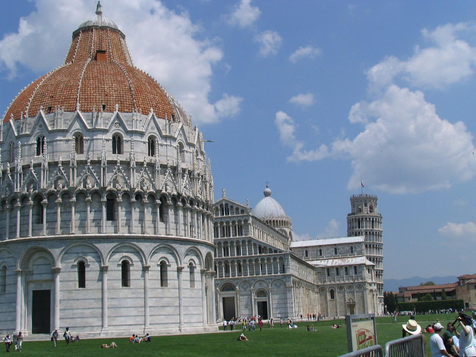 pisa